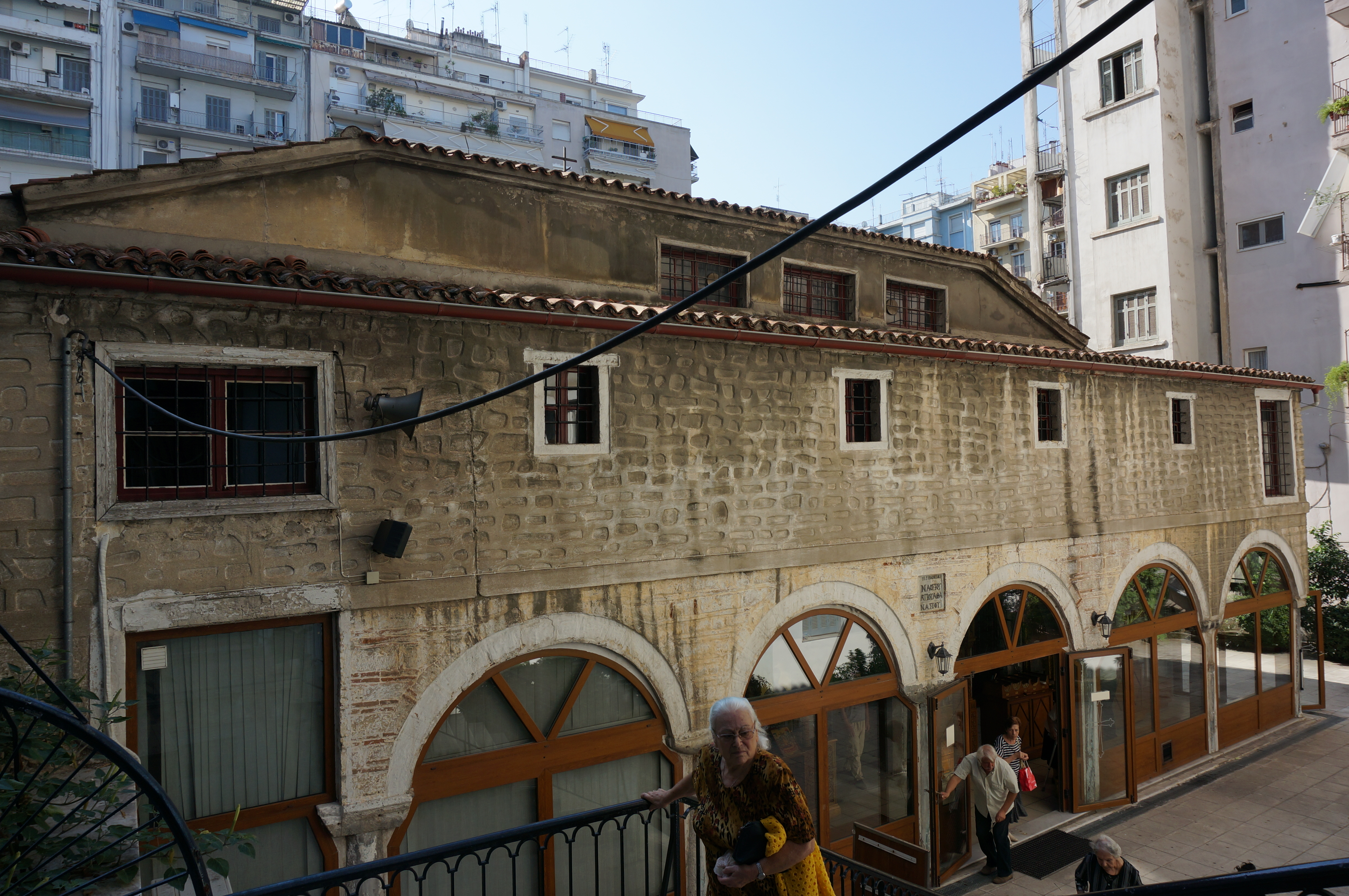 vue de l'église dédiée à Saint Athanase, sur la Via Egniata.